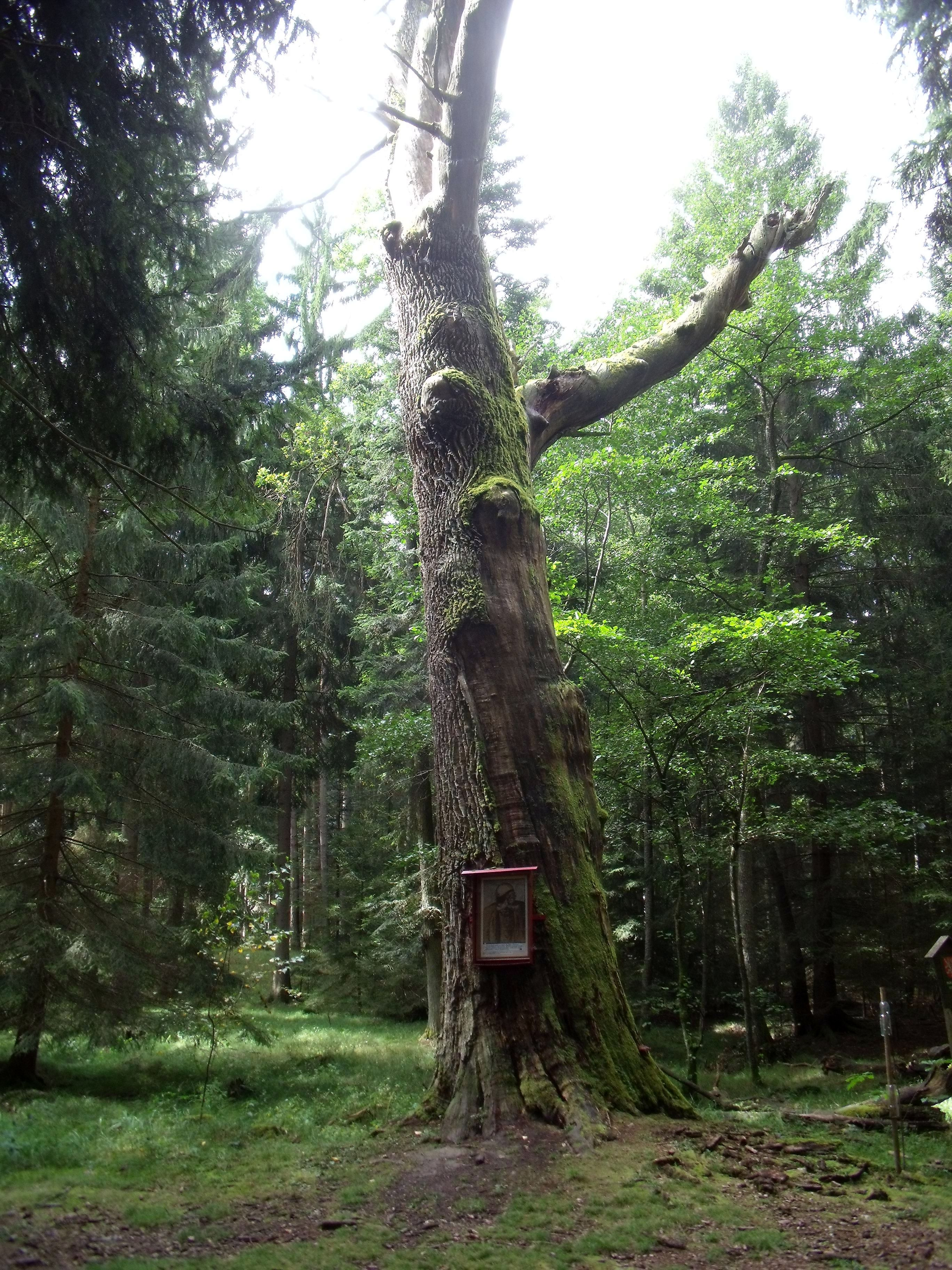 Žižkův dub u Hrutova. Snímek pořízen 10.09.2011